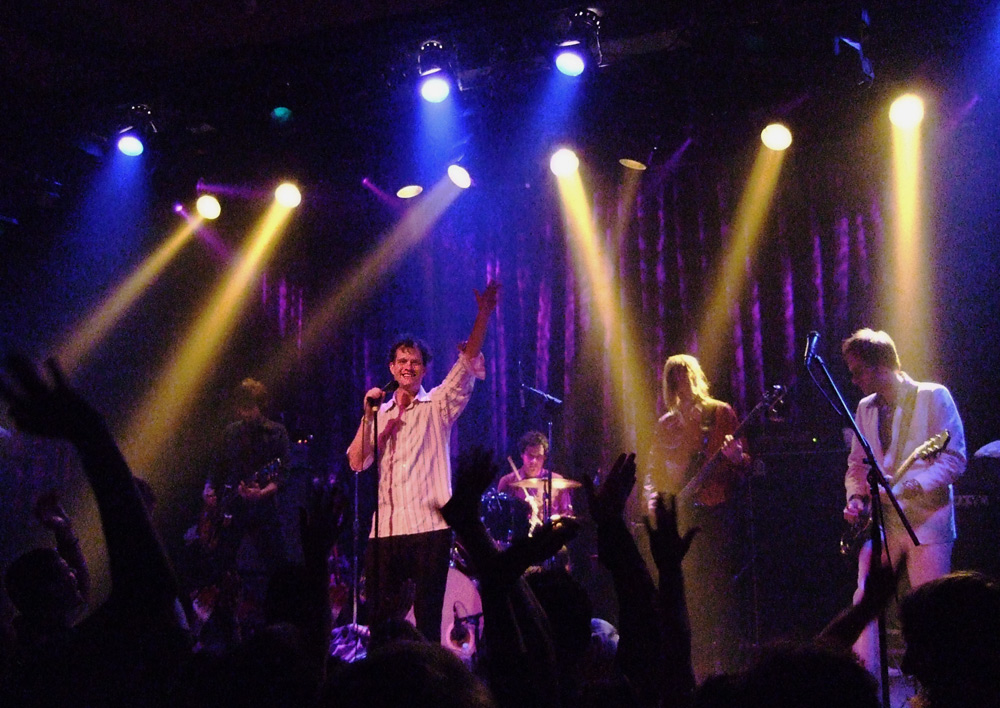 Electric six.